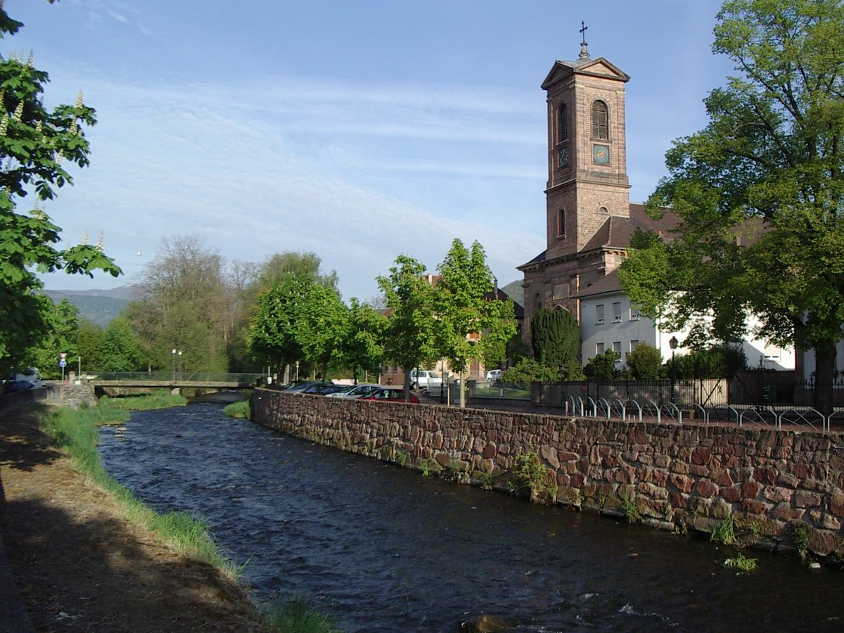 Issenheim, Haut-Rhin, France. The St André church and the river Lauch